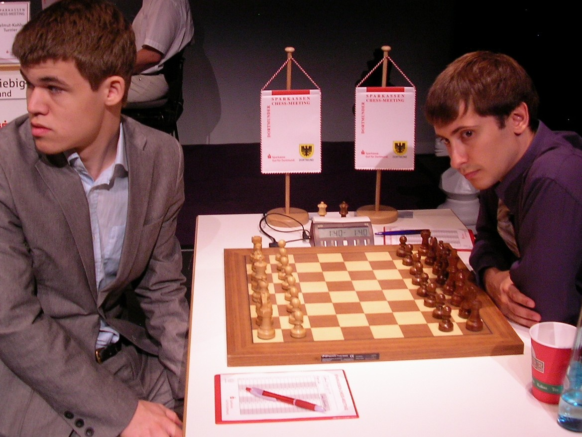 Magnus Carlsen und Dimitri Jakowenko vor Start der ersten Runde der Dortmunder Schachtage 2009